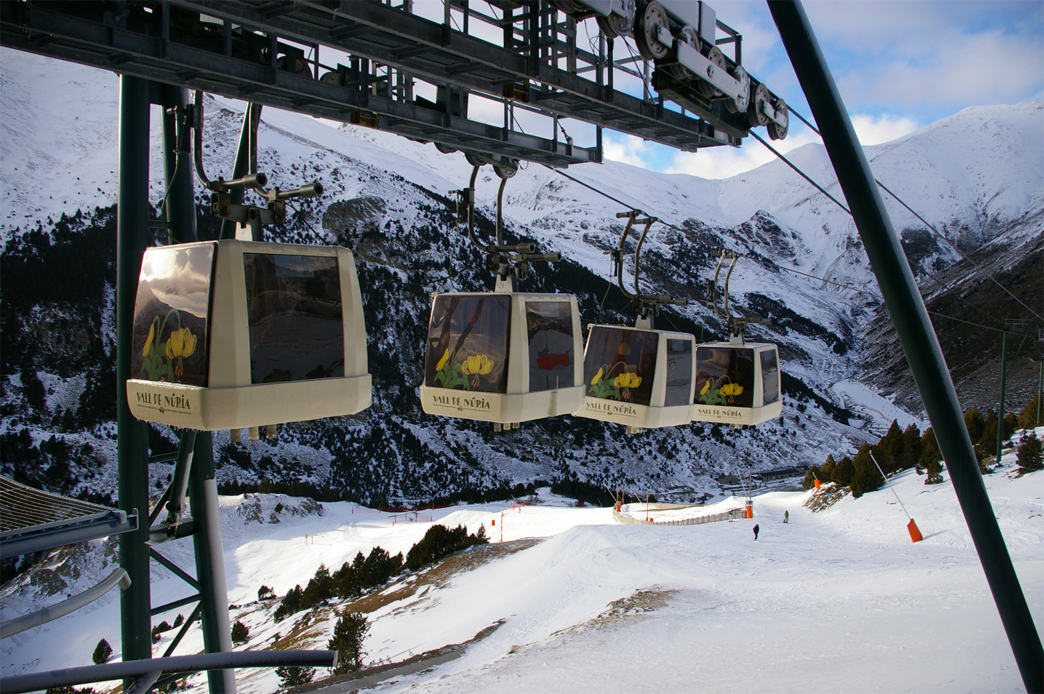 Telecabina Coma del Clot a la Vall de Núria (Ripollès, Catalunya)